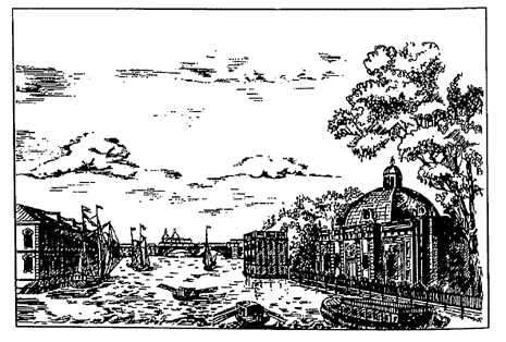 Вид акведука над Фонтанкой на месте Пантелеймоновского моста